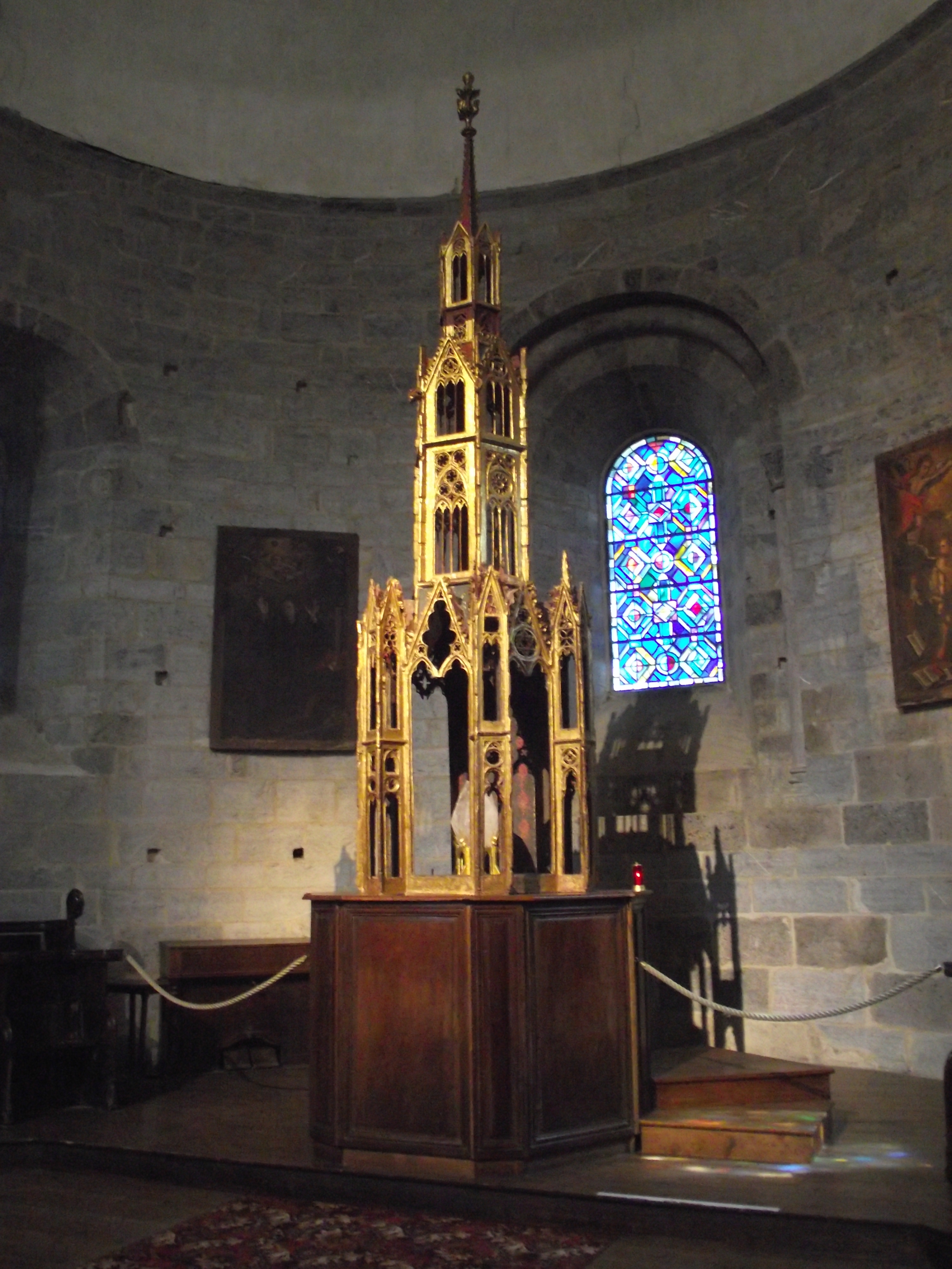 Tabernacle de l'abbatiale de Saint-Savin, Hautes-Pyrénées, France)